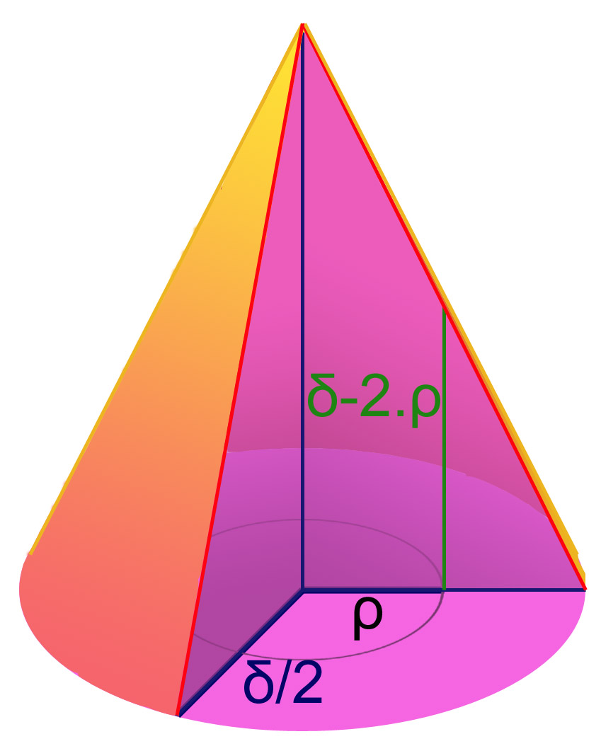 Illustration de l'intégral d'un cône